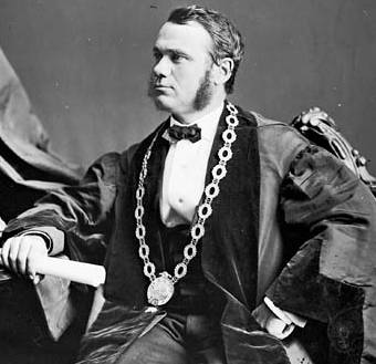 Martineau Mayor (Eugène Martineau)